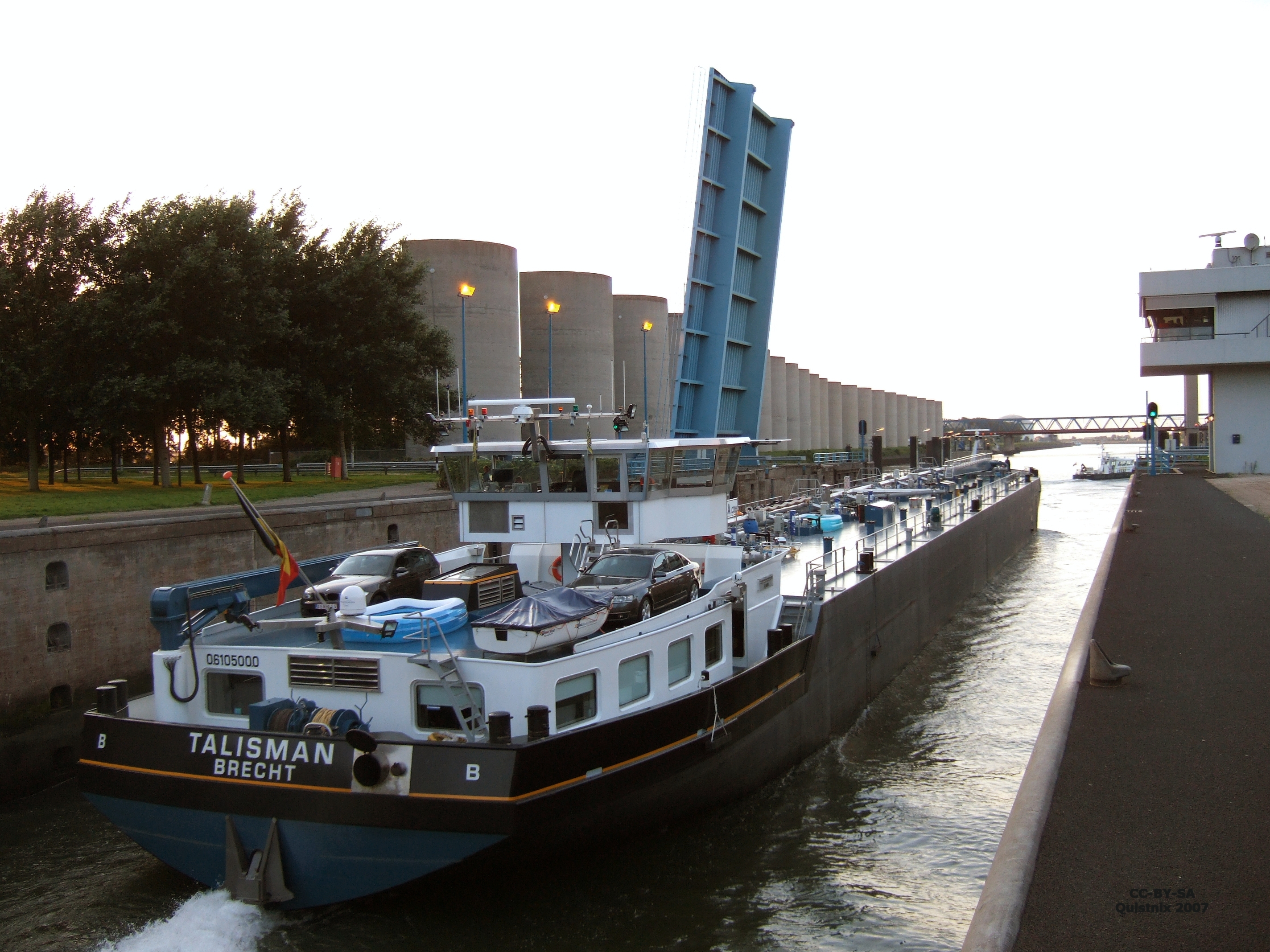 Rozenburgsesluis